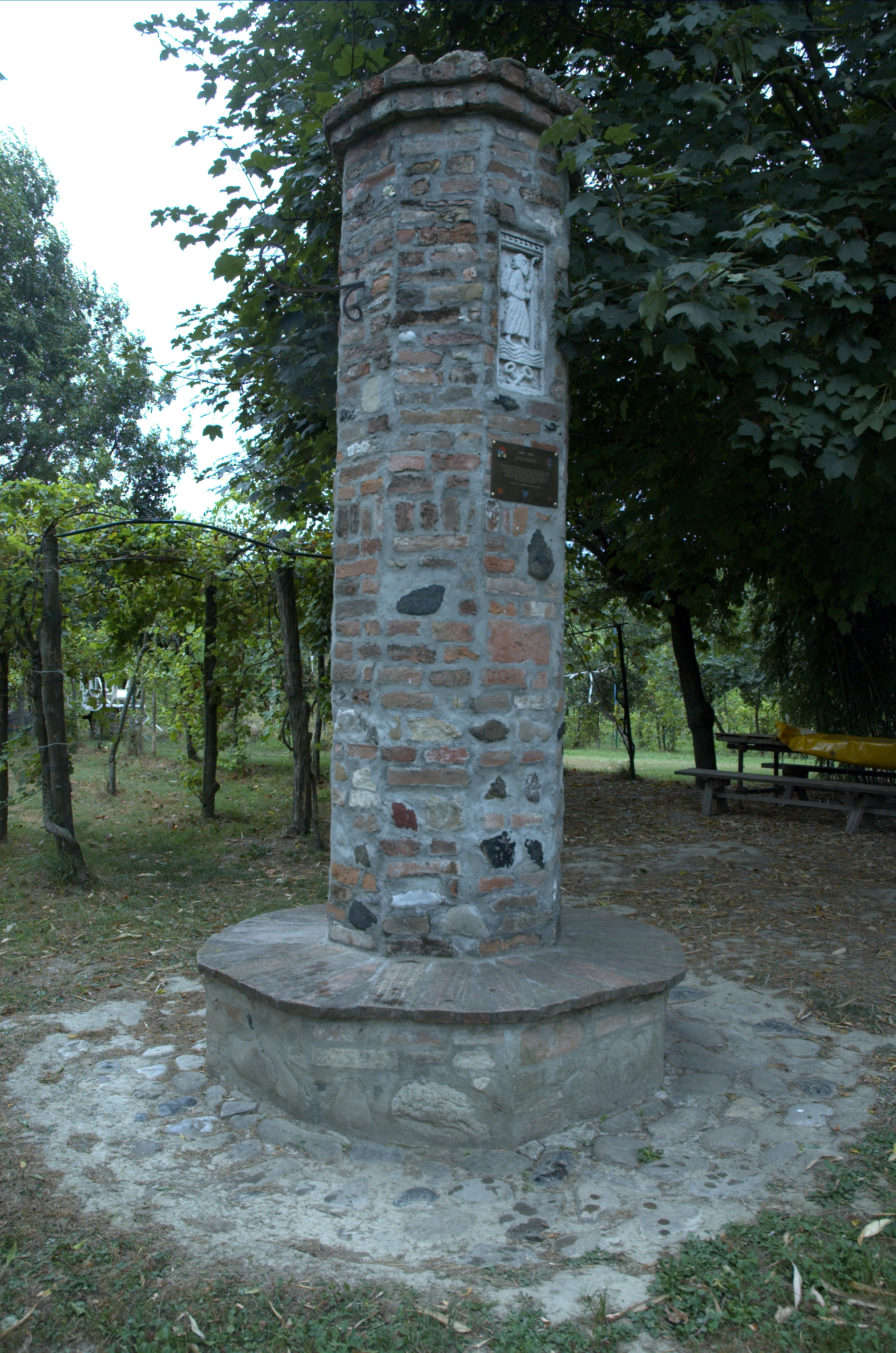 La colonna costruita dalla "Compagnia di Sigerico" di Calendasco presso il porto di Soprarivo, una identica sorge a Corte Sant'Andrea in sponda lombarda, tappa di Sigerico (990 ca.)